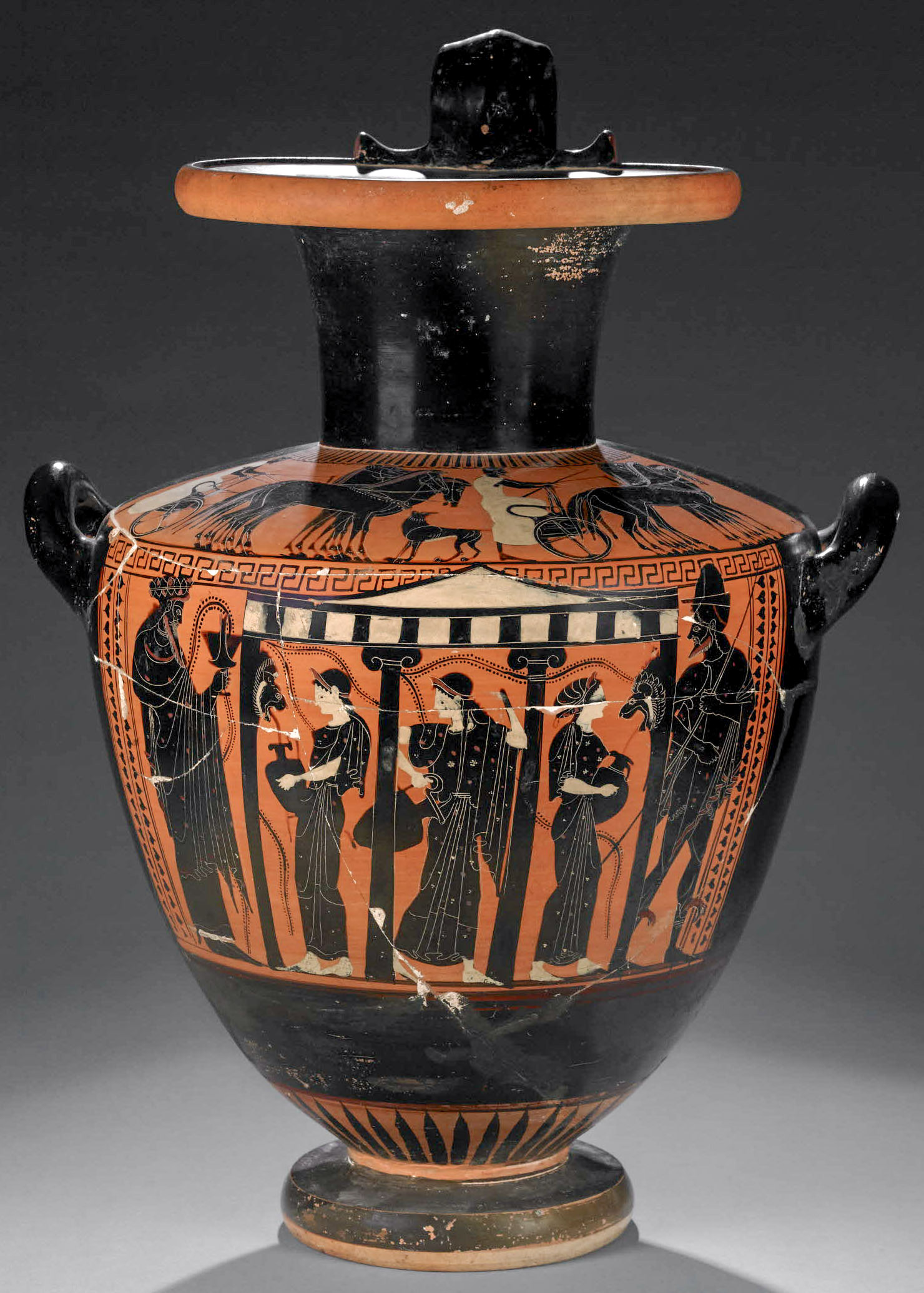 hydria del pittore di Priamo a figure nere, produzione attica